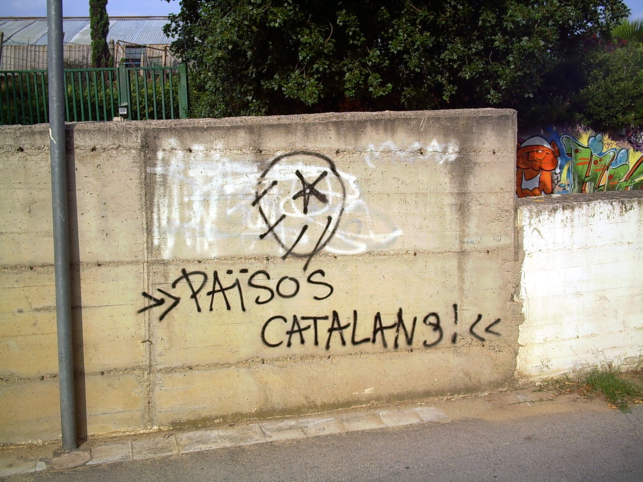 Graffiti pels Països Catalans a Vilassar de Mar (Maresme, Catalunya).